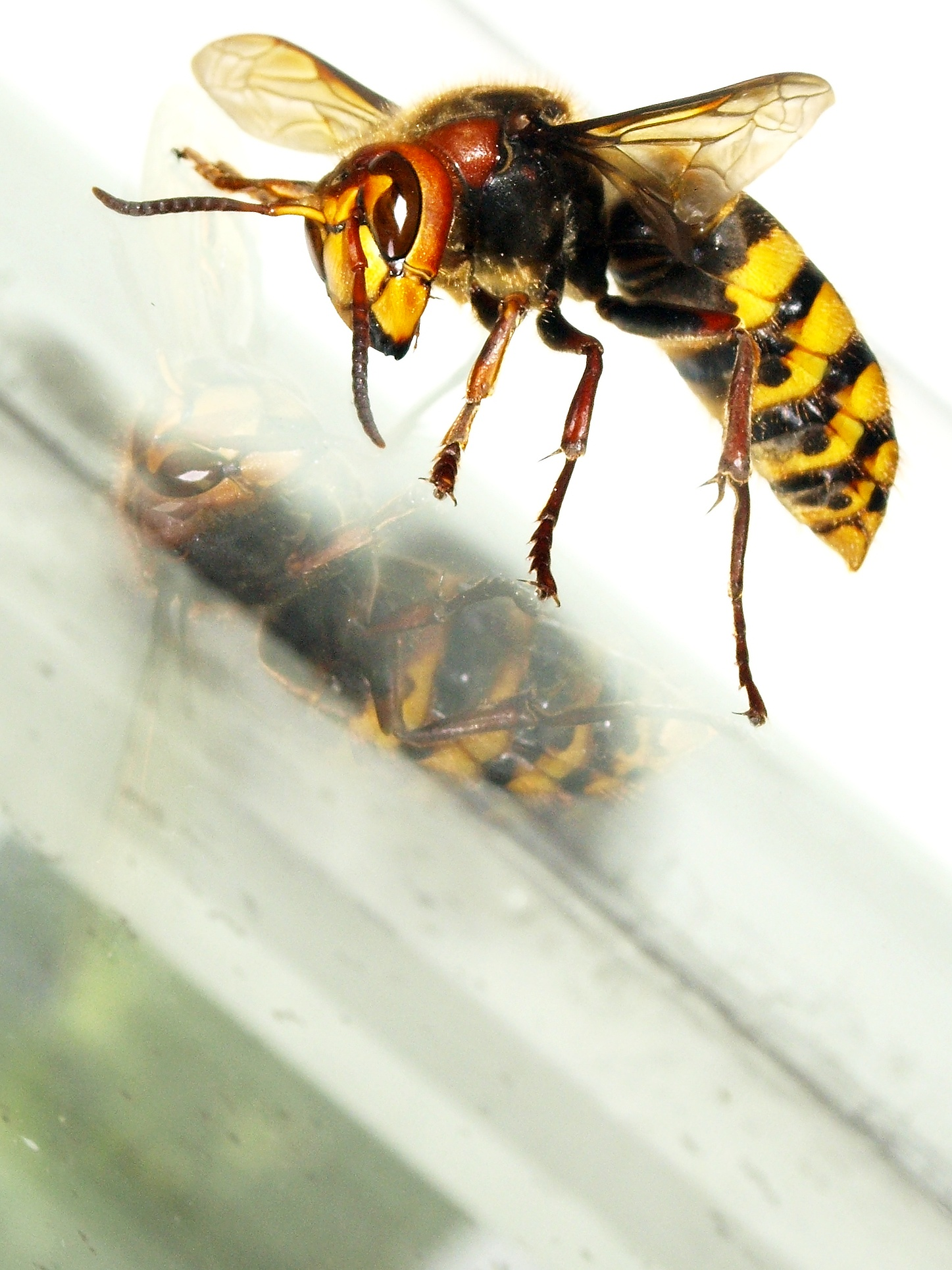 hornet